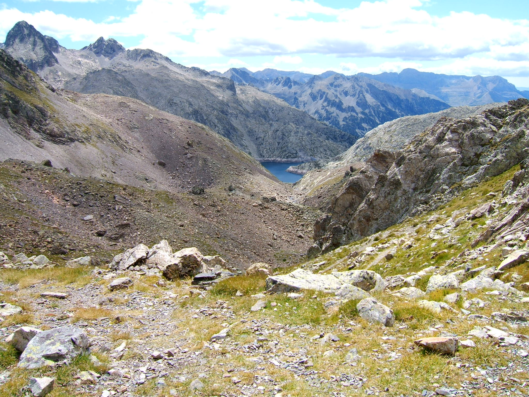 Vue prise depuis le Port du Marcadau vers l'Espagne